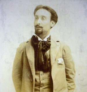 Louis Nattero autour de 1910